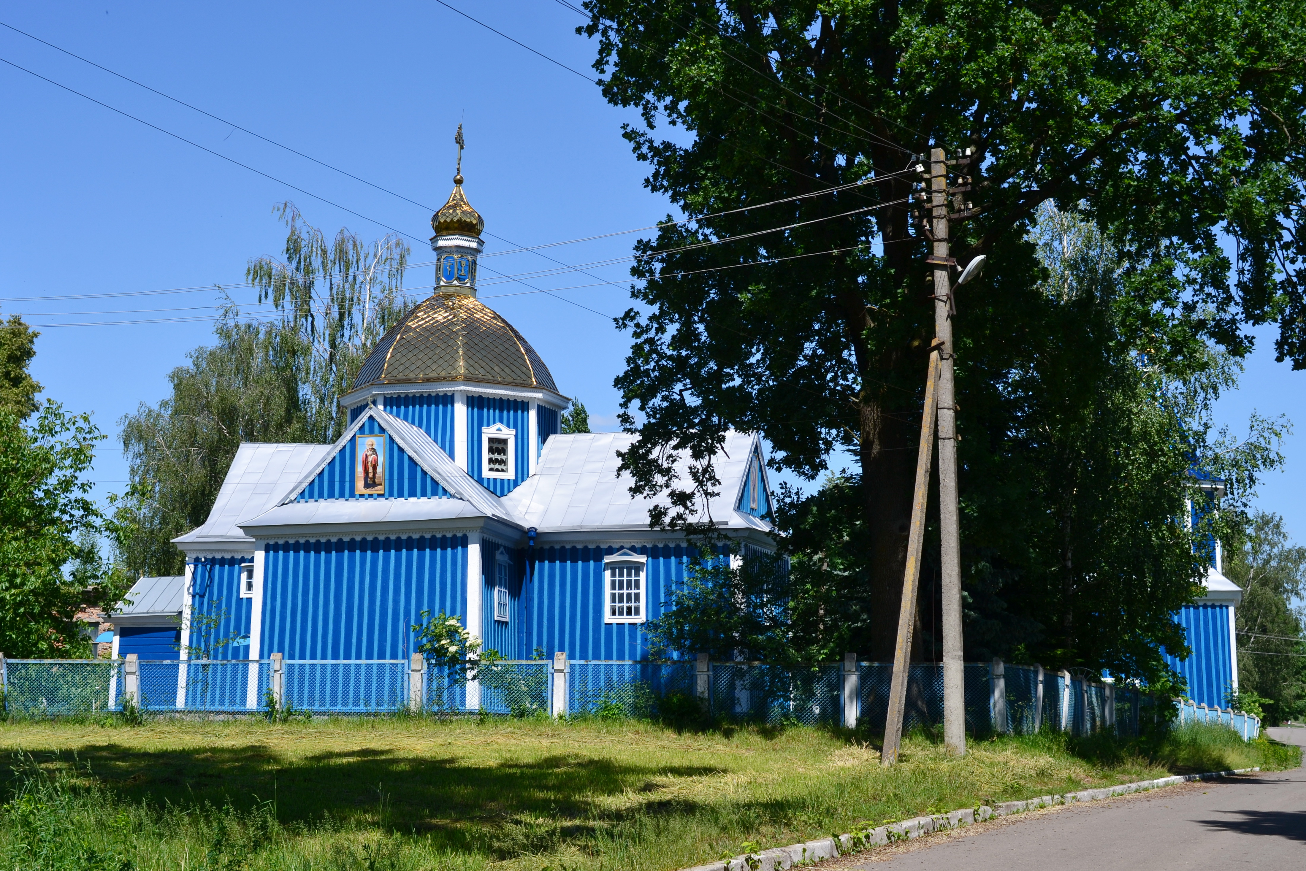 Михайлівська церква (дер.) (1771 рік) - вигляд з півдня - Несвіч (вул. Центральна, 56) Луцький район Волинська область Україна